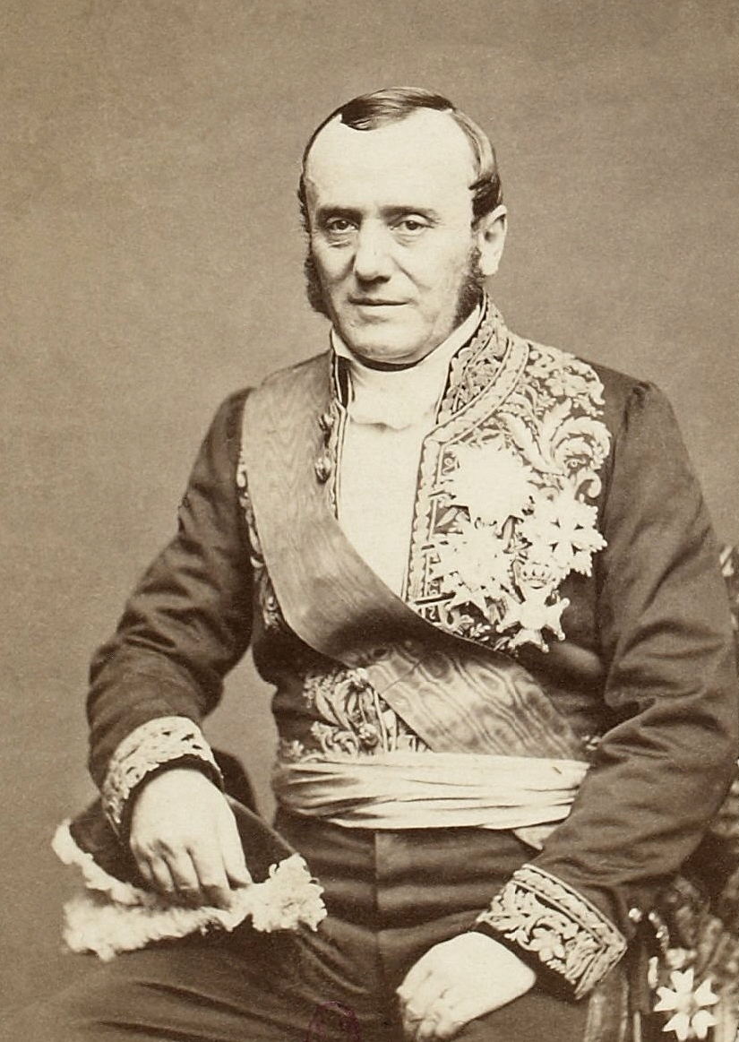 Billault, Adolphe